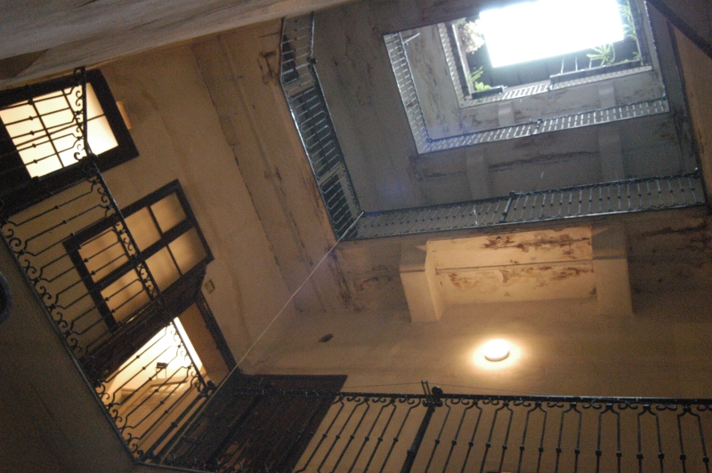 Vienna 2003, info in de Metadata